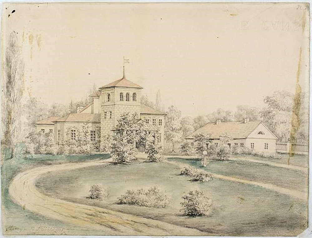 Беларуская (тарашкевіца): Гарны (Harny). Сядзіба